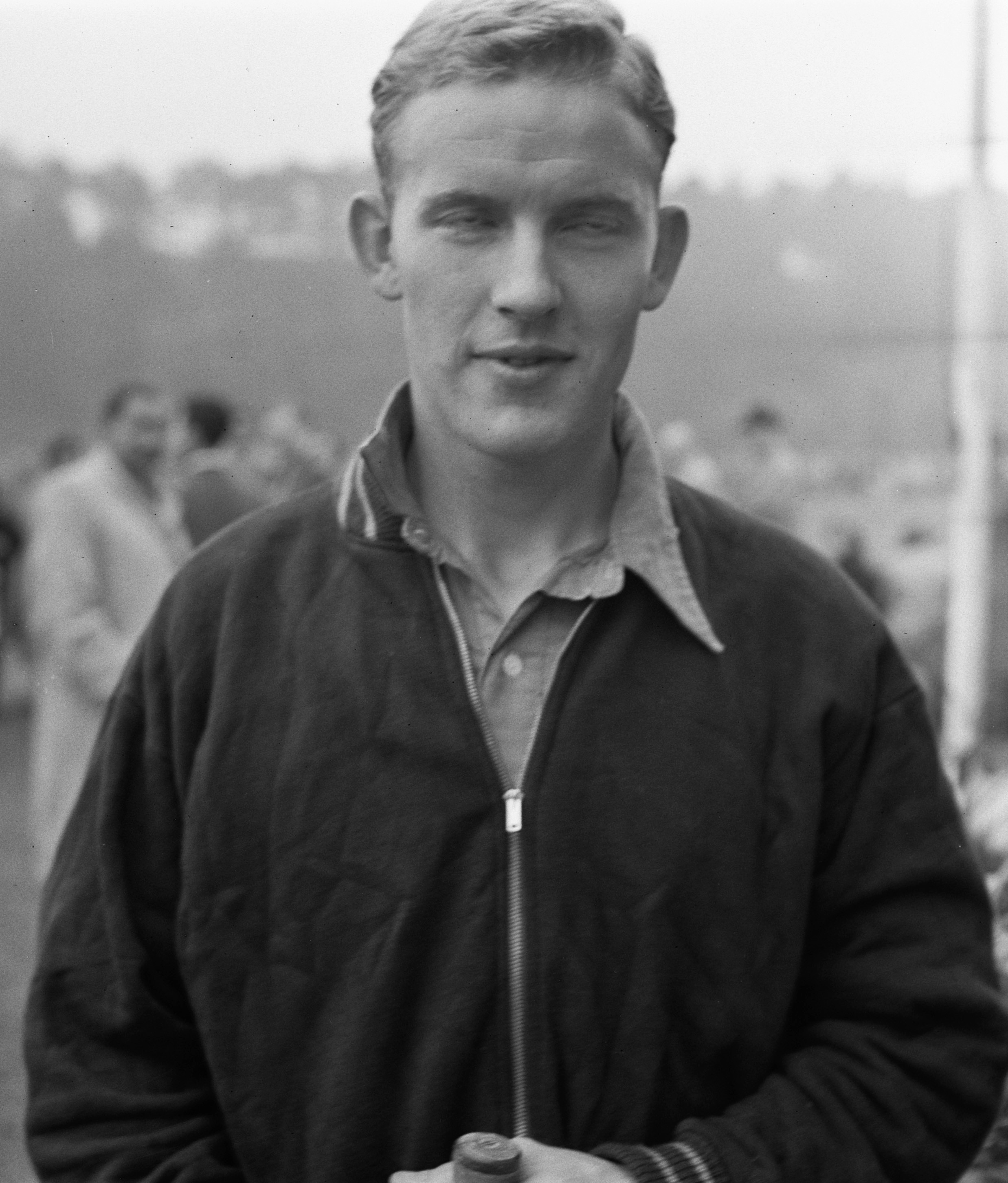 Koppen Nederlands hockey-elftal . J. W. van Erven Doore